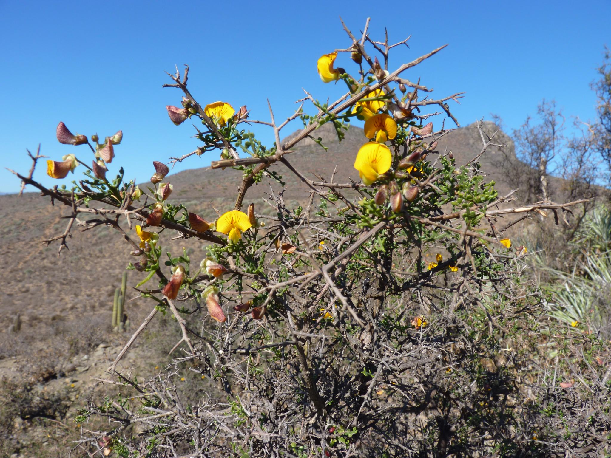 nótese las espinas y ramillas dicotómicas, para diferenciar esta especie de Adesmia confusa